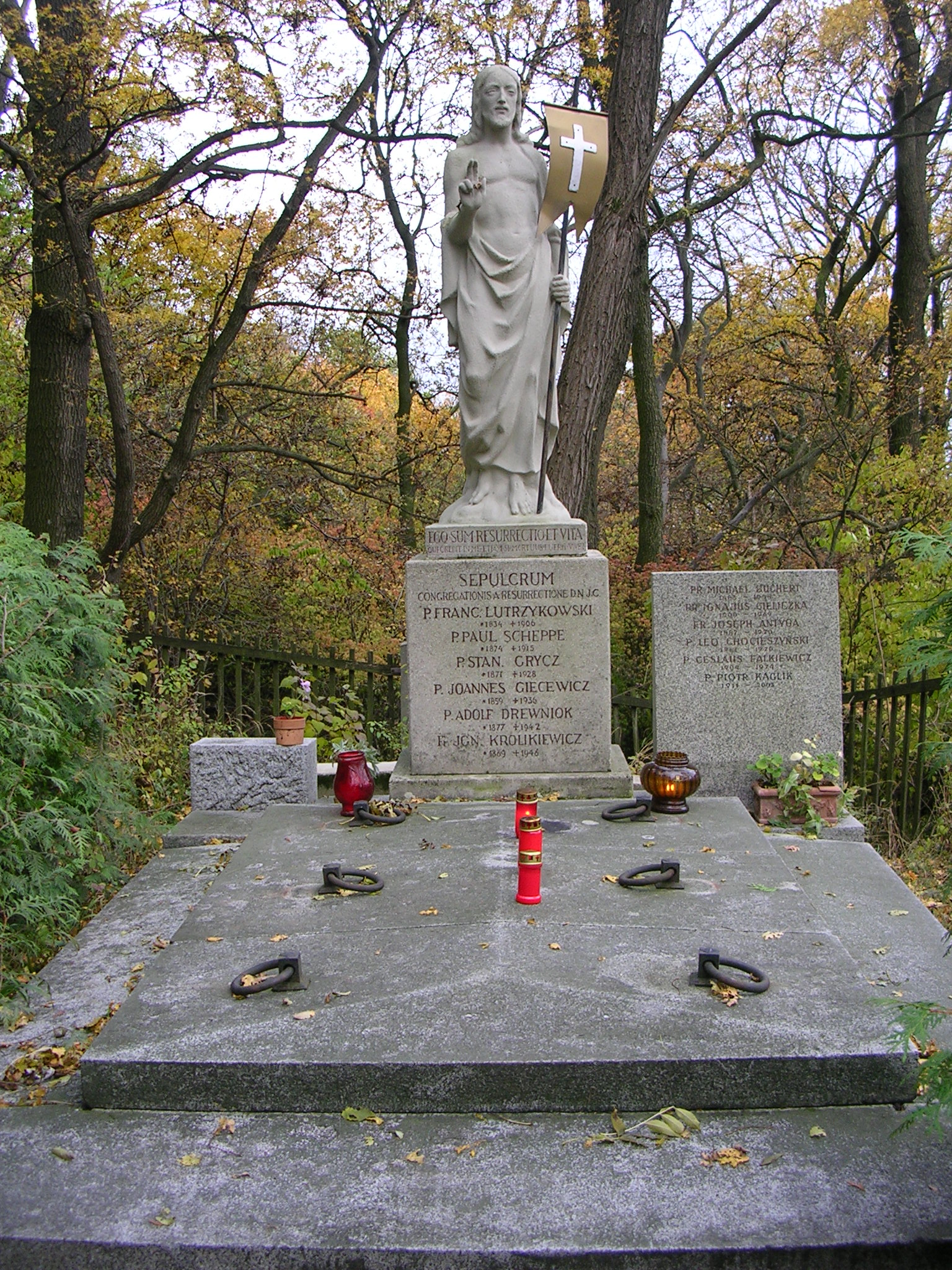 Waldfriedhof Kahlenberg